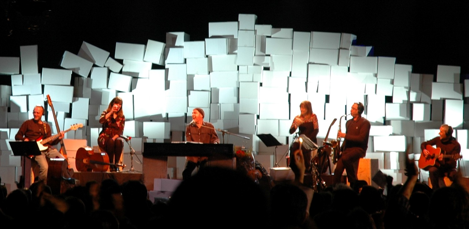 Darrer concert de Lluís Llach a Verges